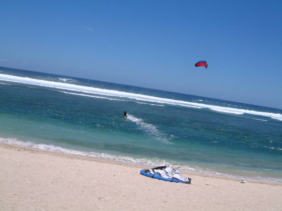 Photo prise par Nerijp en novembre-décembre 2004. Elle est libre de droit d'après cette page.